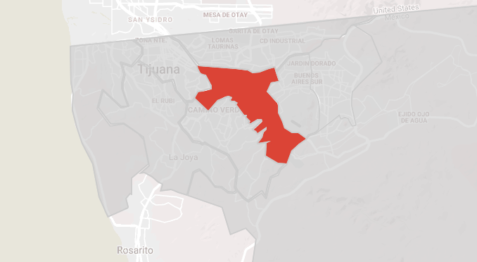 Demarcación territorial de La Mesa en Tijuana